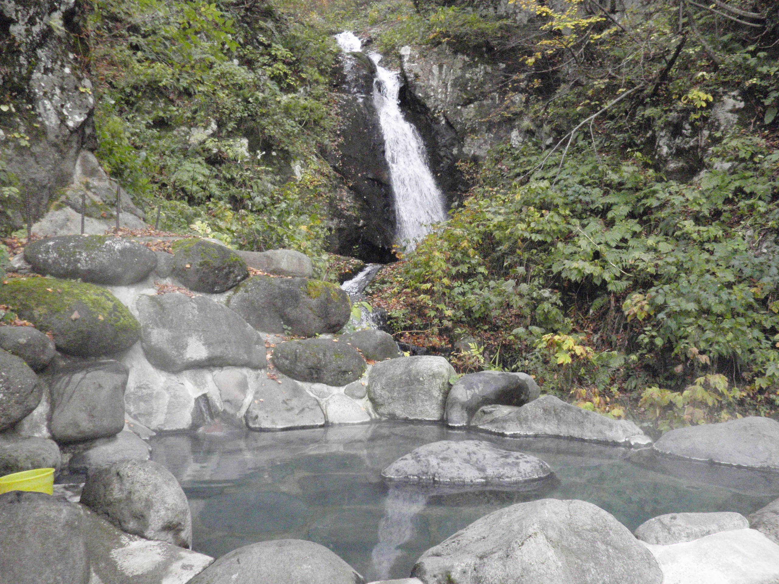 新高湯温泉、吾妻屋旅館、滝見露天風呂